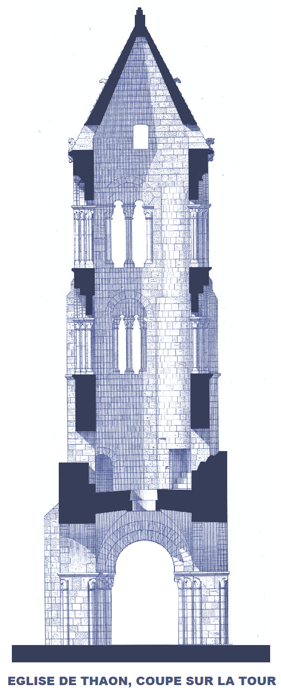 Eglise de Thaon, Calvados, coupe sur la tour (image du domaine public, Ruprich Robert, modifiée)